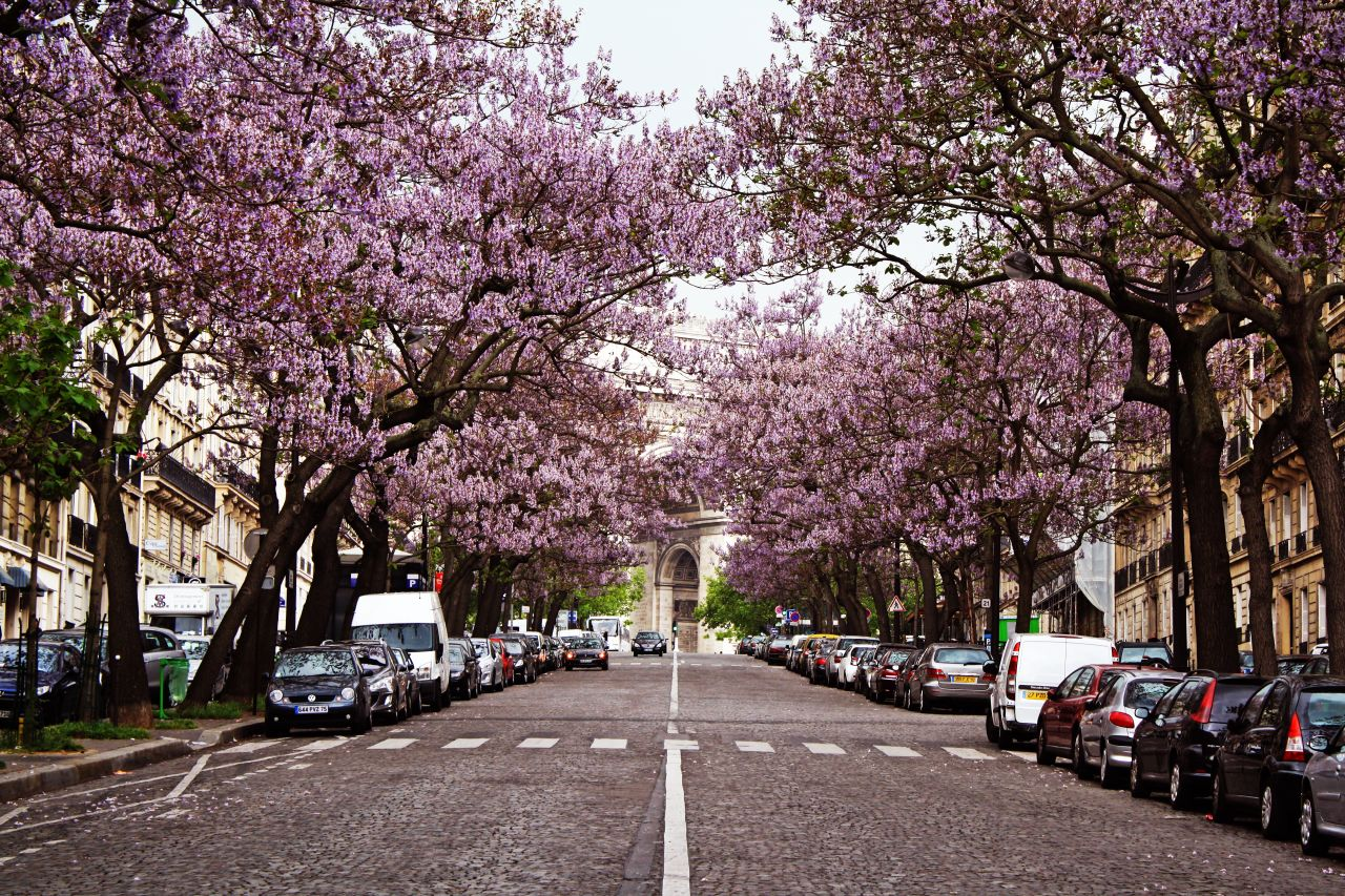 Avenue Carnot, Paris, France.